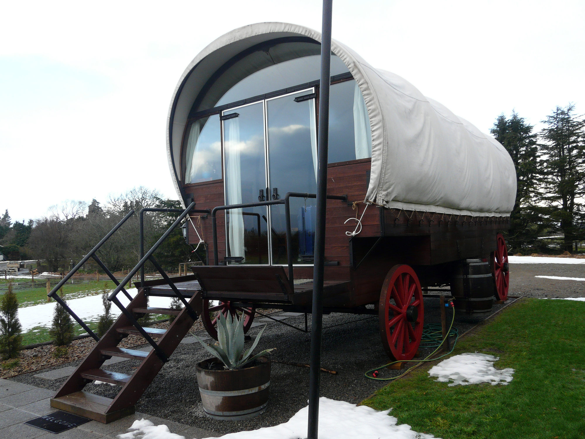 Type de logement glamping à Kirwee, Nouvelle-Zélande